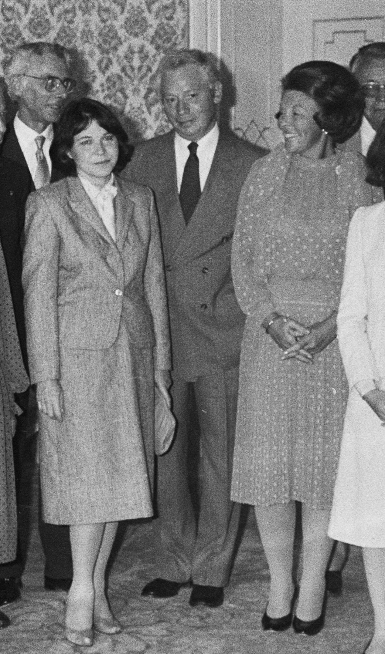 Koningin Beatrix ontvangt Nobelprijswinnaars.